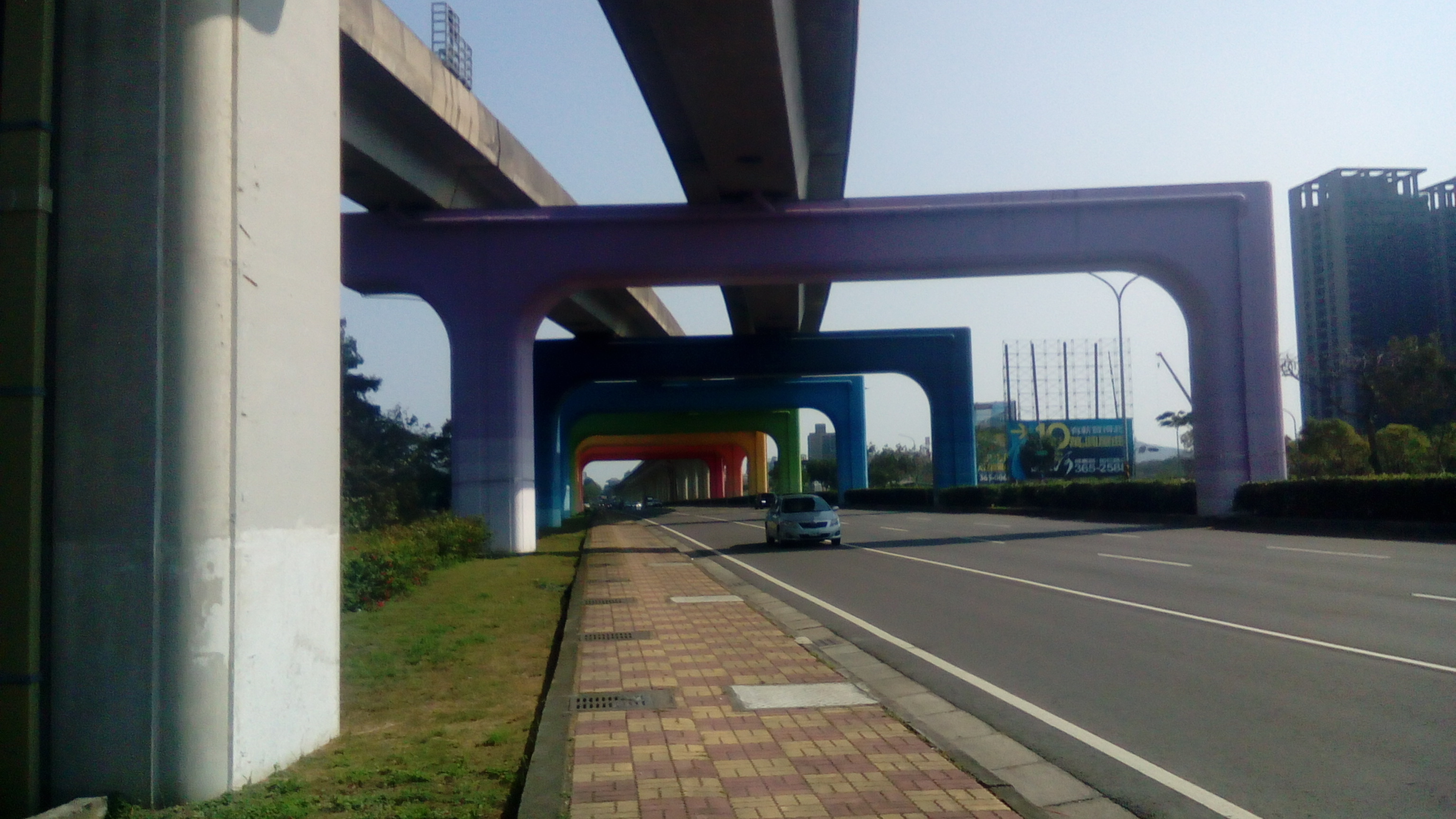 同上